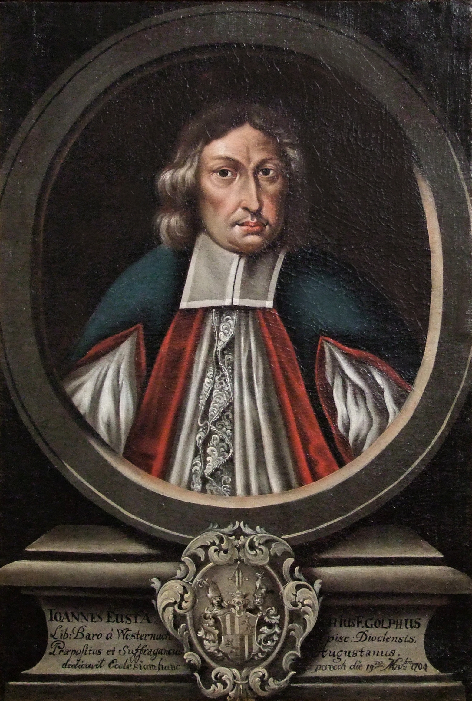 St. Michael in Stockach in Schwaben